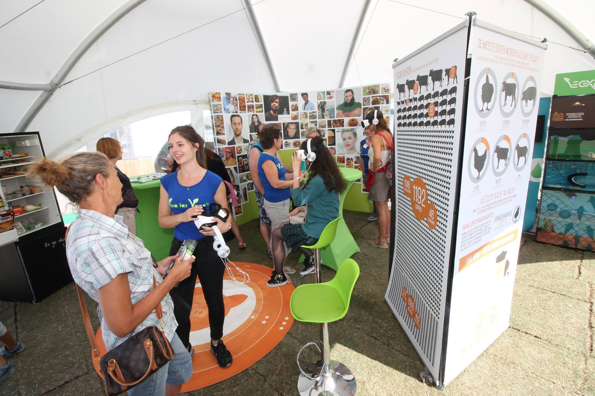 De Vegxperience stand van Viva Las Vega's (ProVeg Nederland) tijdens het Stadstuinenfestival Almere 2017.